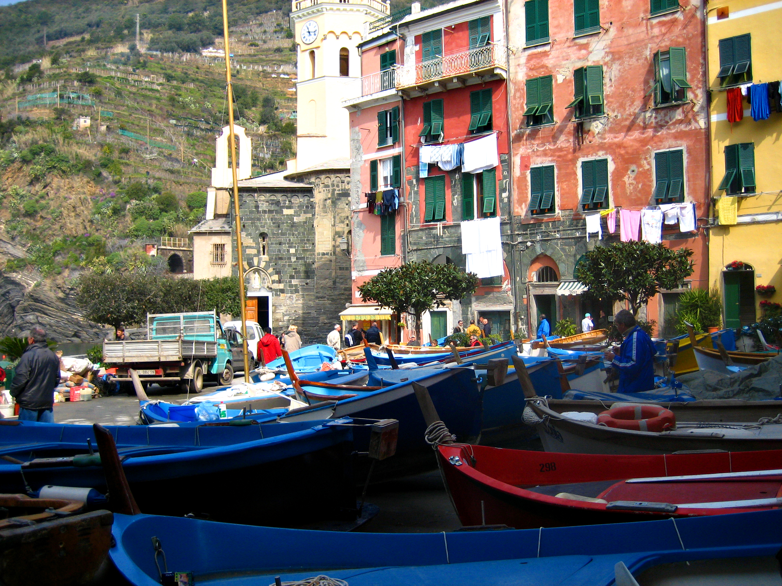 Vernazza, Liguria, Italia